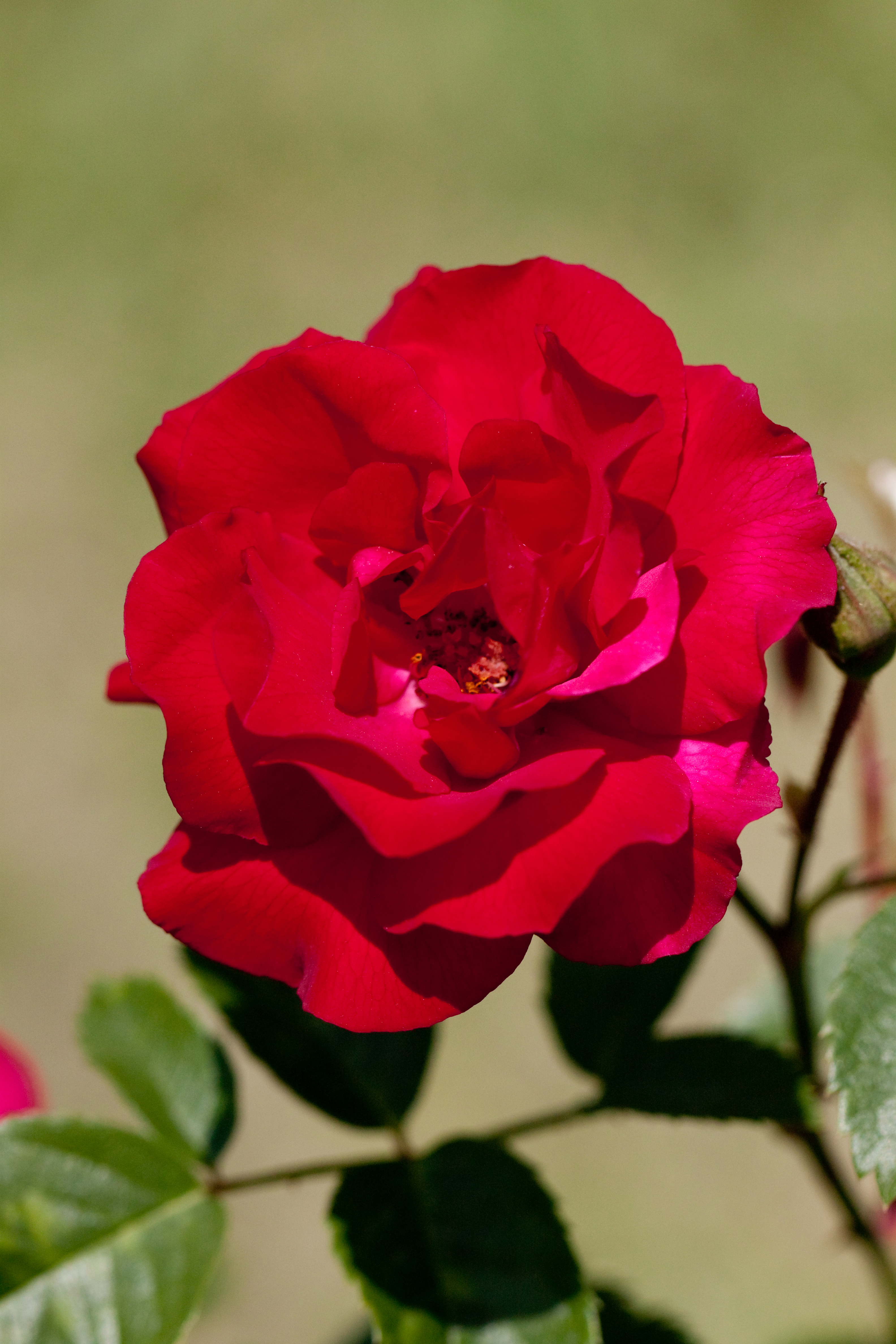 Ulmer Munster. ウルメール・ムンスター。